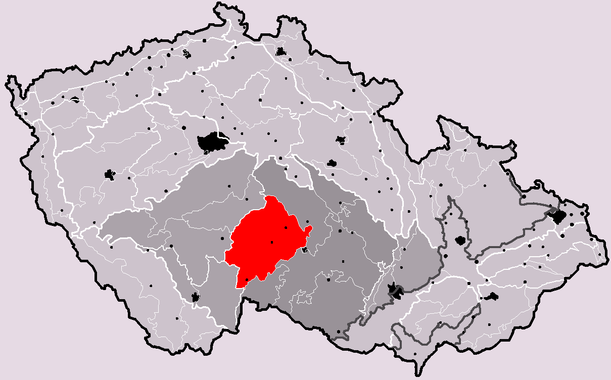 Poloha geomorfologického celku Křemešnická vrchovina v rámci České republiky. Hercynský systém Hercynská pohoří I Česká vysočina I2 (II) Česko-moravská subprovincie I2C (IIC) Českomoravská vrchovina I2C-1 (IIC-1) Křemešnická vrchovina